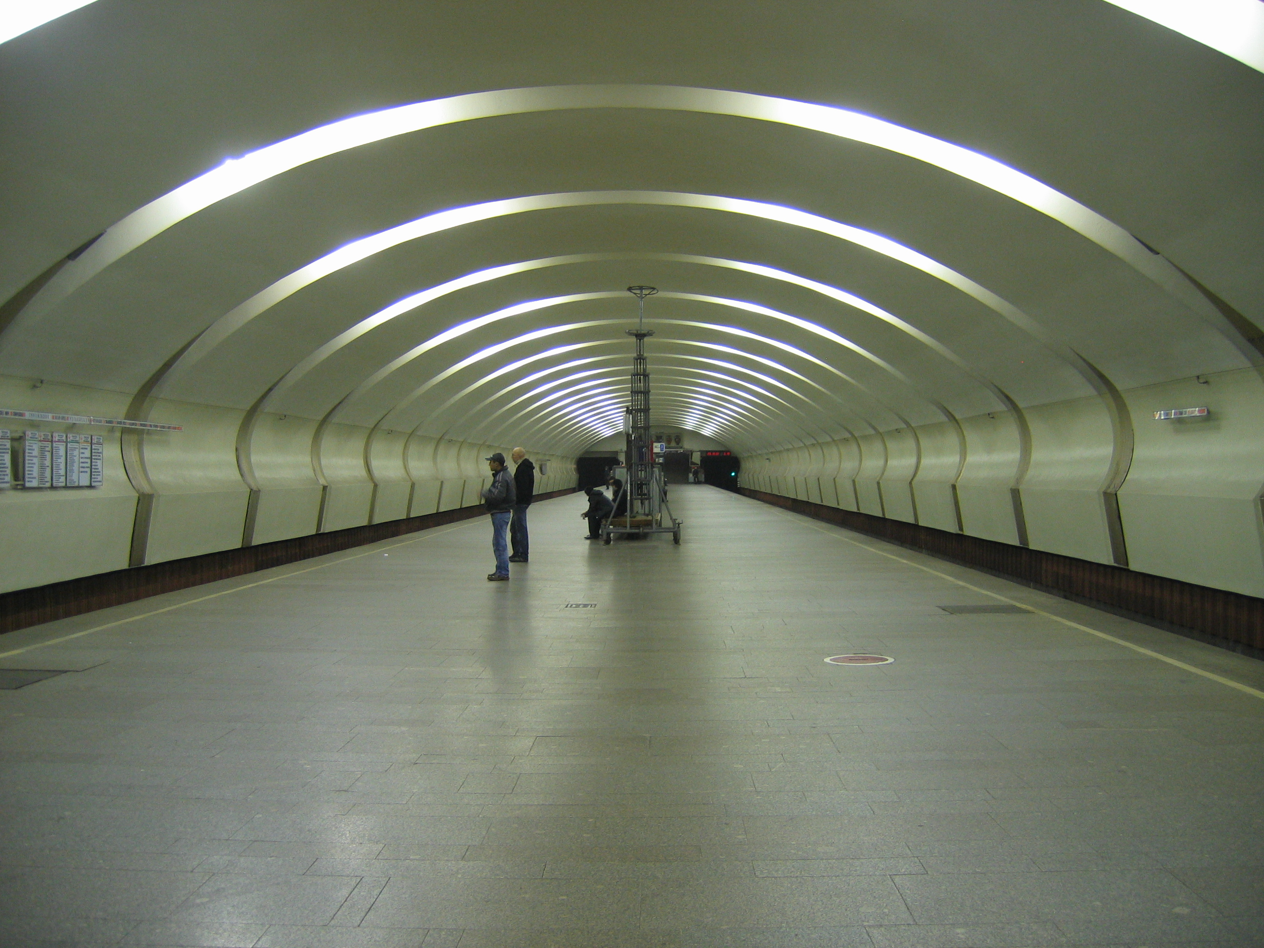 Московский метрополитен. Станция Коньково